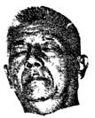 Ba_Than.jpg